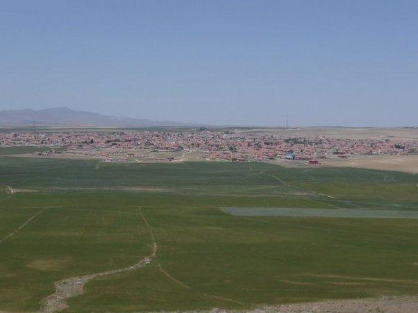 Tavşançalının Hemen Yanında Bulunan Tepeden Çekilmiş Bir Resim